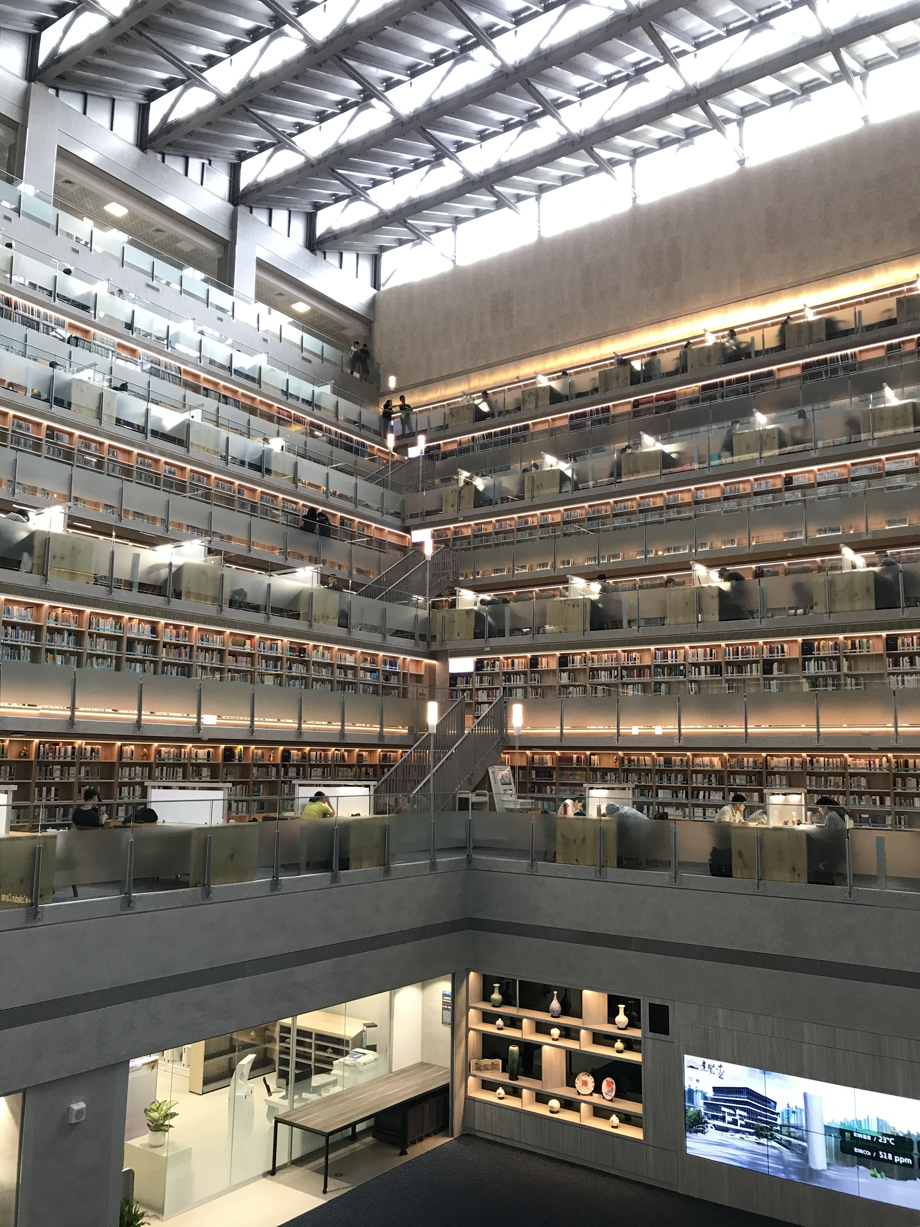 達賢圖書館內部